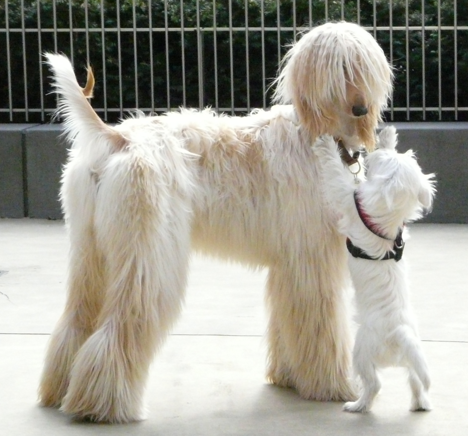 Small Dog Confidence